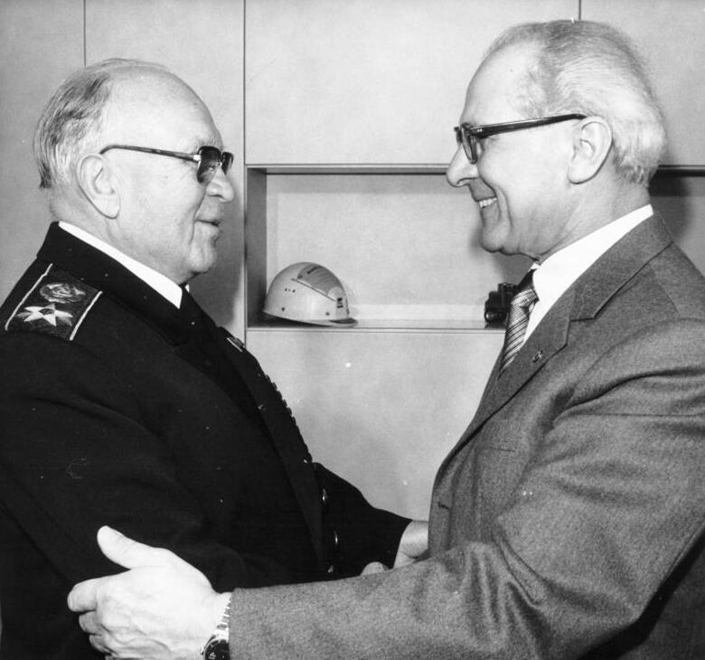 Title: Berlin, Empfang Sergej Gorschkow bei Erich Honecker People in the image: Honecker, Erich: Staatsratsvorsitzender, Generalsekretär des ZK der SED, DDR (GND 118553399) Gorschkow, Sergej Georgewitsch: Flottenadmiral, Sowjetunion (GND 131282018) Factual corrections and alternative descriptions are encouraged separately from the original description. Additionally errors can be reported at this page to inform the Bundesarchiv. Original historic description: ADN-ZB/ Franke / 21.1.80 / Berlin: Der Generalsekretär des ZK der SED und Vorsitzende des Staatsrates der DDR; Erich Honecker (r.) empfing Flottenadmiral Sergej Gorschkow, Oberkommandierender der Seekriegsflotte der UdSSR und Stellvertreter des Ministers für Verteidigung der UdSSR.